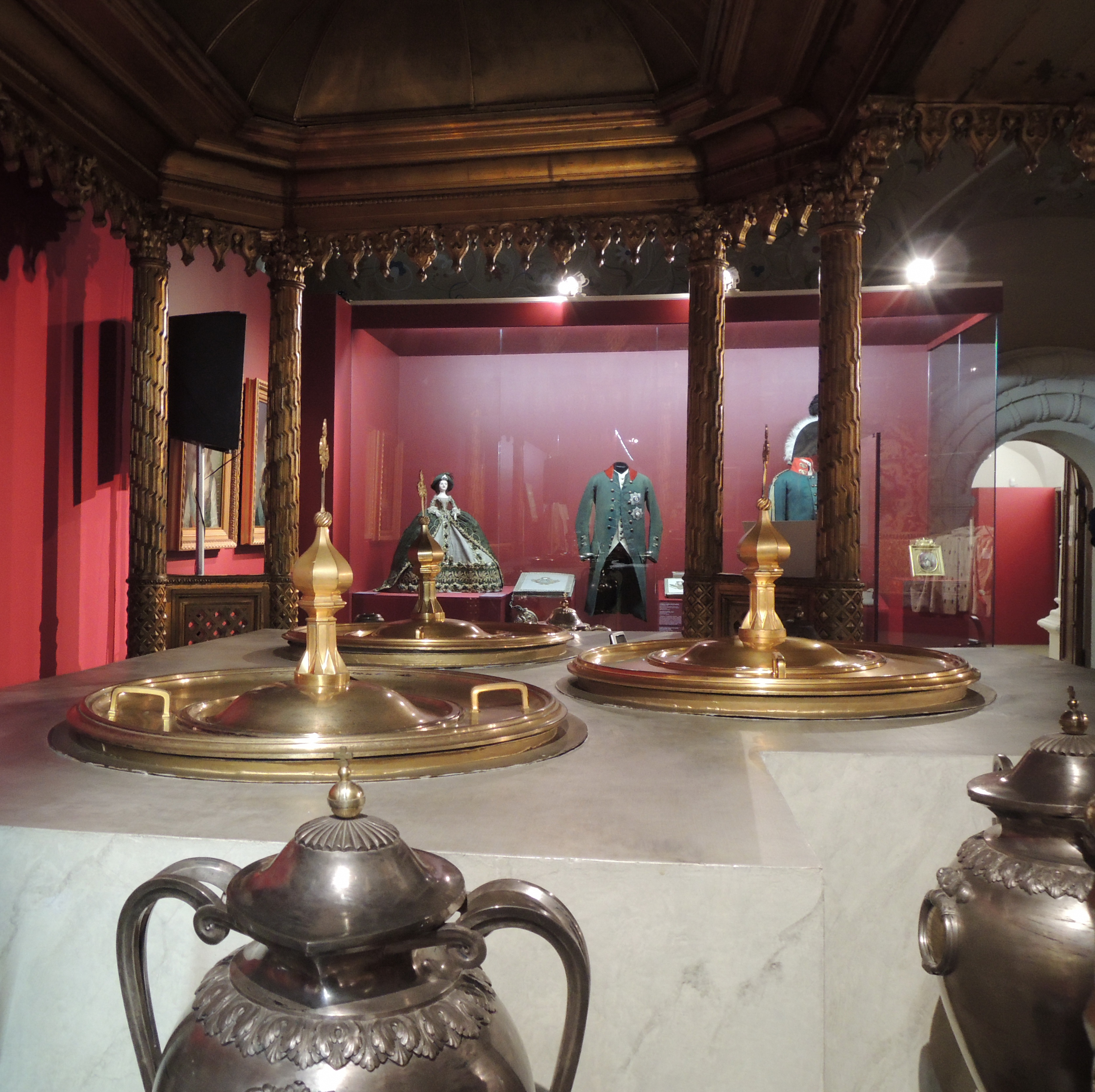 Мироваренная палата Патриаршьей резиденции Московского Кремля